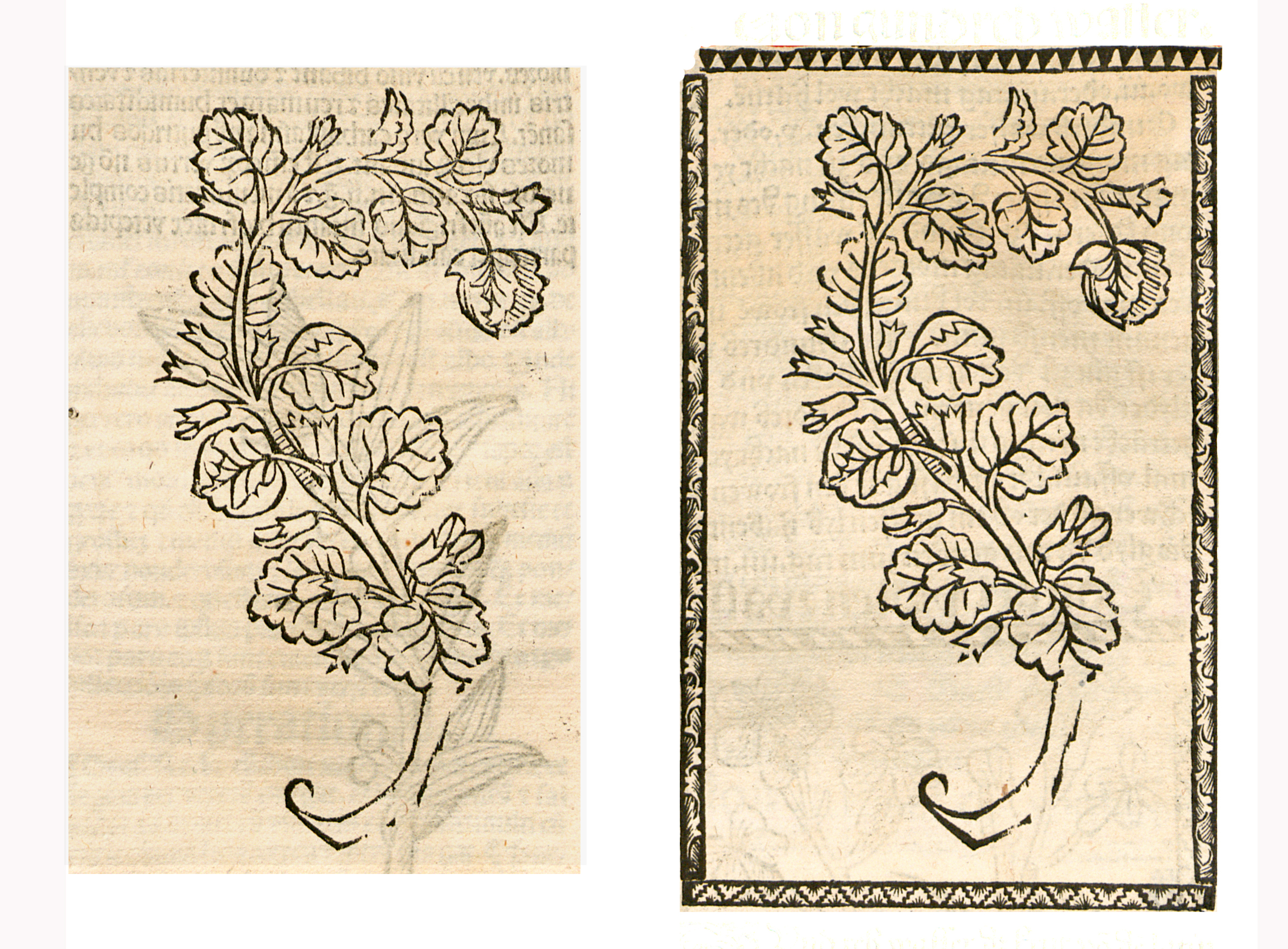 Abbildung von: Gundreb (Glechoma hederacea)